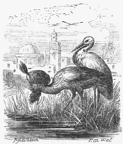 Szene aus Die Geschichte von Kalif Storch: Kalif und Großwesir nach der Verwandlung